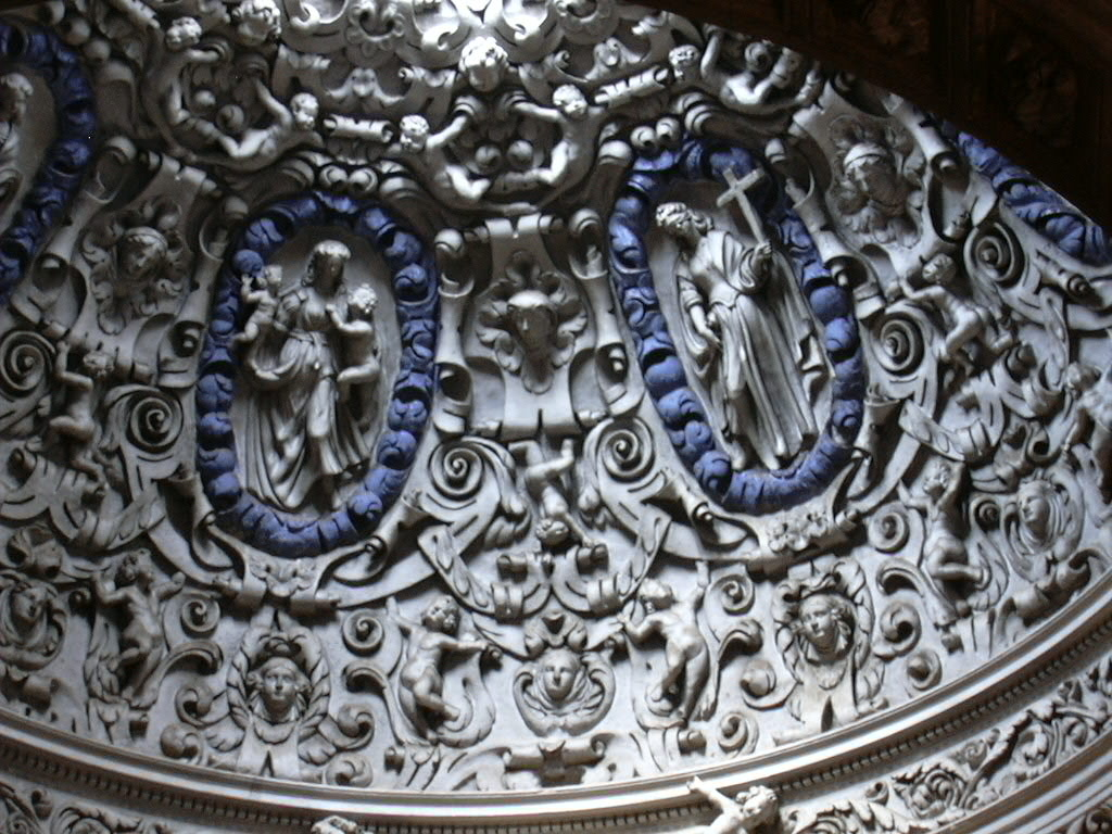 Zaragoza - San Pablo - Cúpula interior